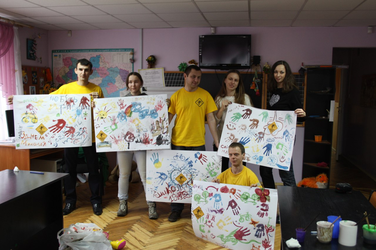 Миколай